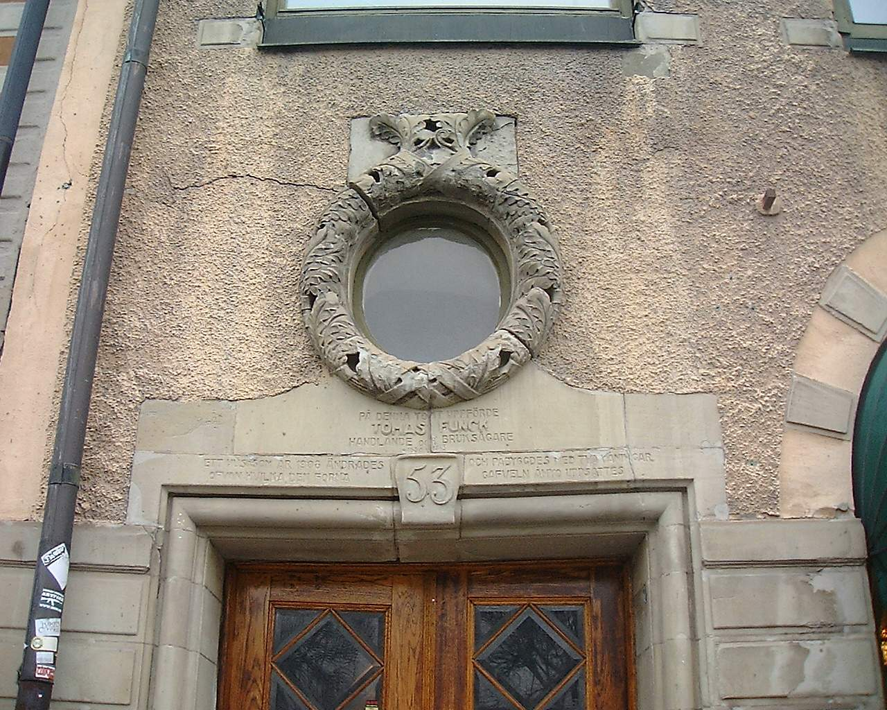 Kornhamnstorg, Gamla stan, Stockholm